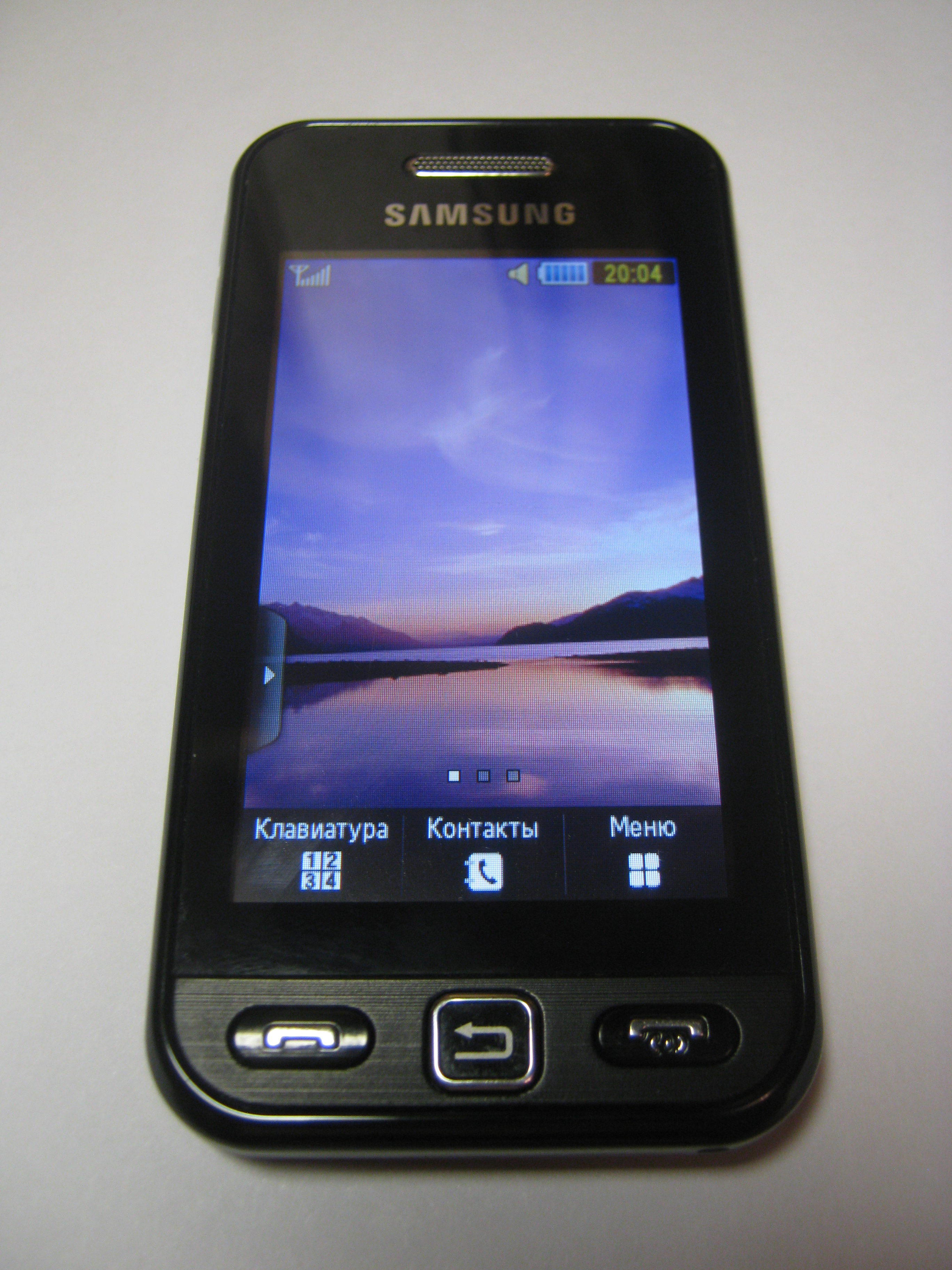 Мобильный телефон Samsung GT-S5230 Star. Фотография сделана цифровой фотокамерой Canon PowerShot A480 с разрешением 10 Мпкс. Автор снимка Воловик Виталий Владимирович.